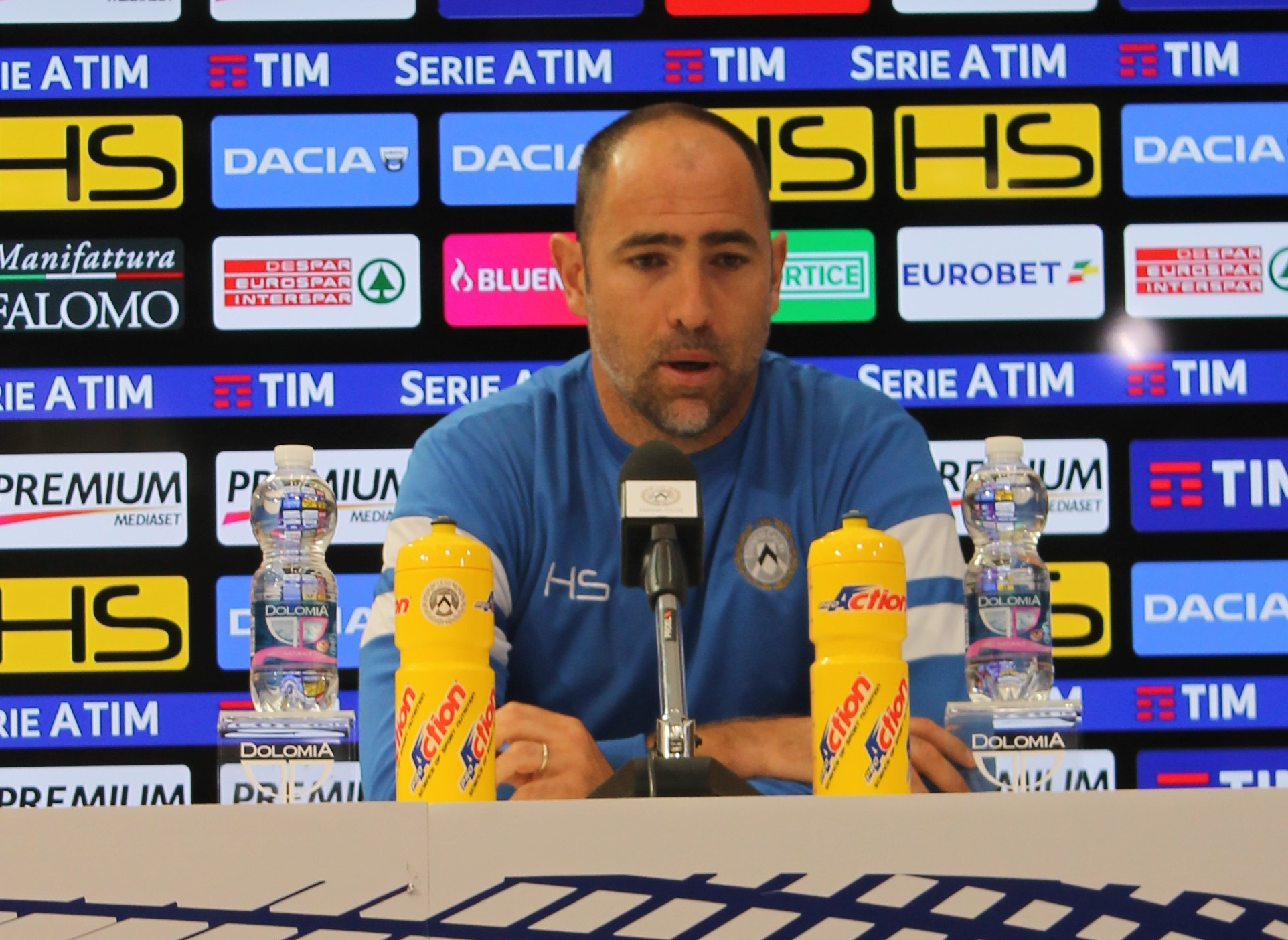 Tudor in conferenza stampa durante la sua avventura all'Udinese del 2018